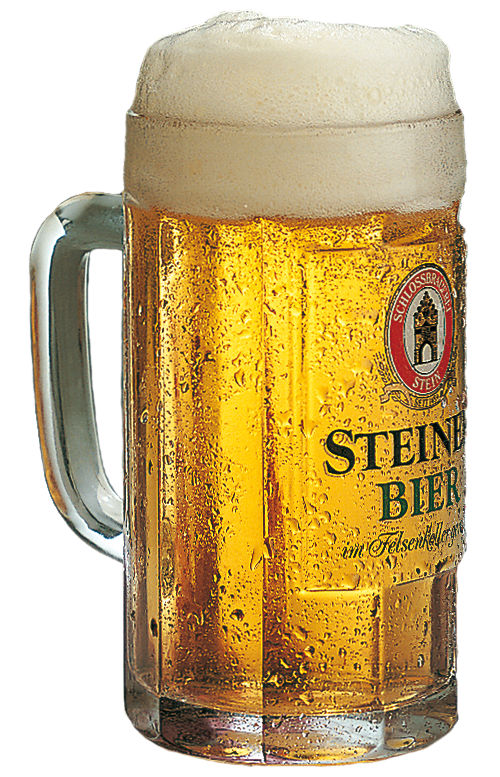 Export Hell im 0,5-Liter-Seidel